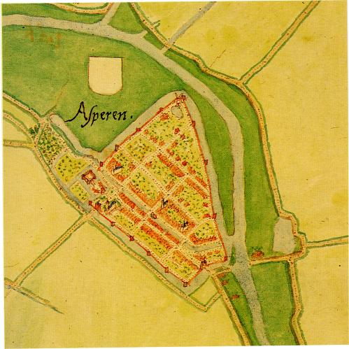 De historische stad Asperen rond 1560